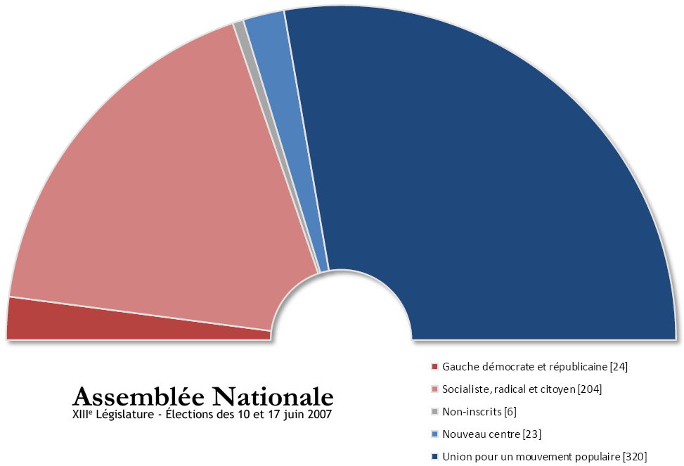 Assemblée Nationale française issue des élections législatives de juin 2007